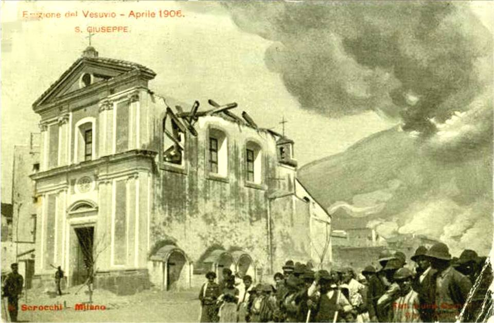 San Giuseppe Vesuviano (NA) - Chiesa danneggiata dall'eruzione del Vesuvio del 1906. ("Eruzione del Vesuvio - Aprile 1906. San Giuseppe".) Cartolina. Autore sconosciuto.